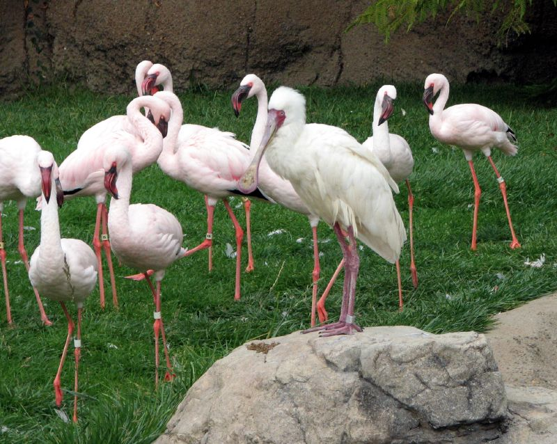 Platalea alba